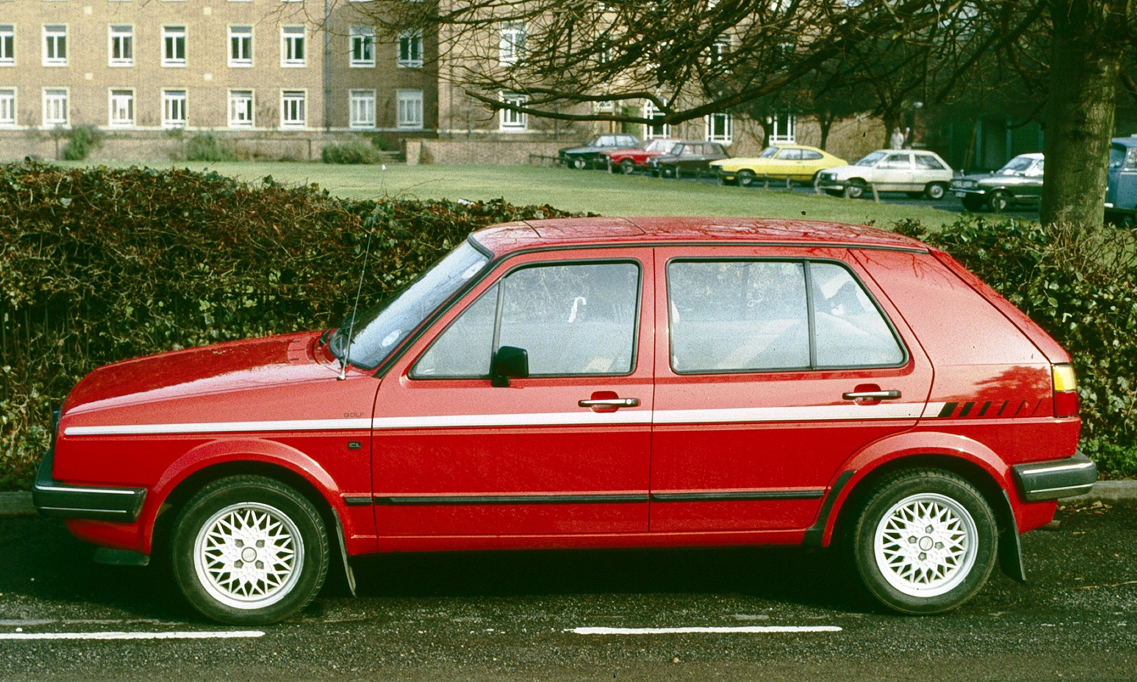 Volkswagen Golf 5 door in profile